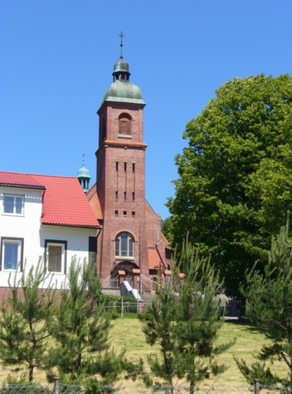 Budzów - rzymskokatolicki kościół parafialny pw. MB Pocieszenia